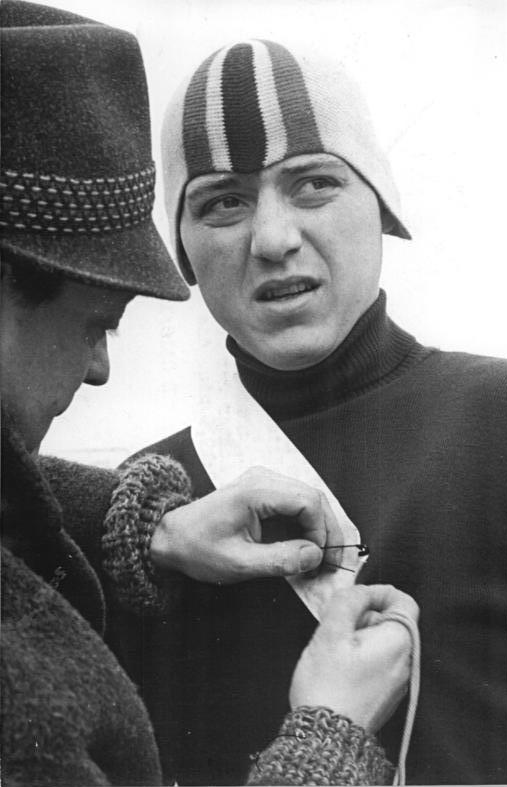 Hermann Strutz Zentralbild Kohls 16.3.1963 Deutsche Meisterschaften im Eisschnellauf..am 16. und 17.3.1963 auf der neuerbauten 400-m-Kunsteisbahn im Dynamo-Sportforum in Berlin mit Gästen aus Rumänien und Österreich. UBz: Hermann Strutz, mehrfacher österreichischer Landesmeister und Achter der Weltmeisterschaft, lief über 5000m mit 8:19,5min. die schnellste Zeit.